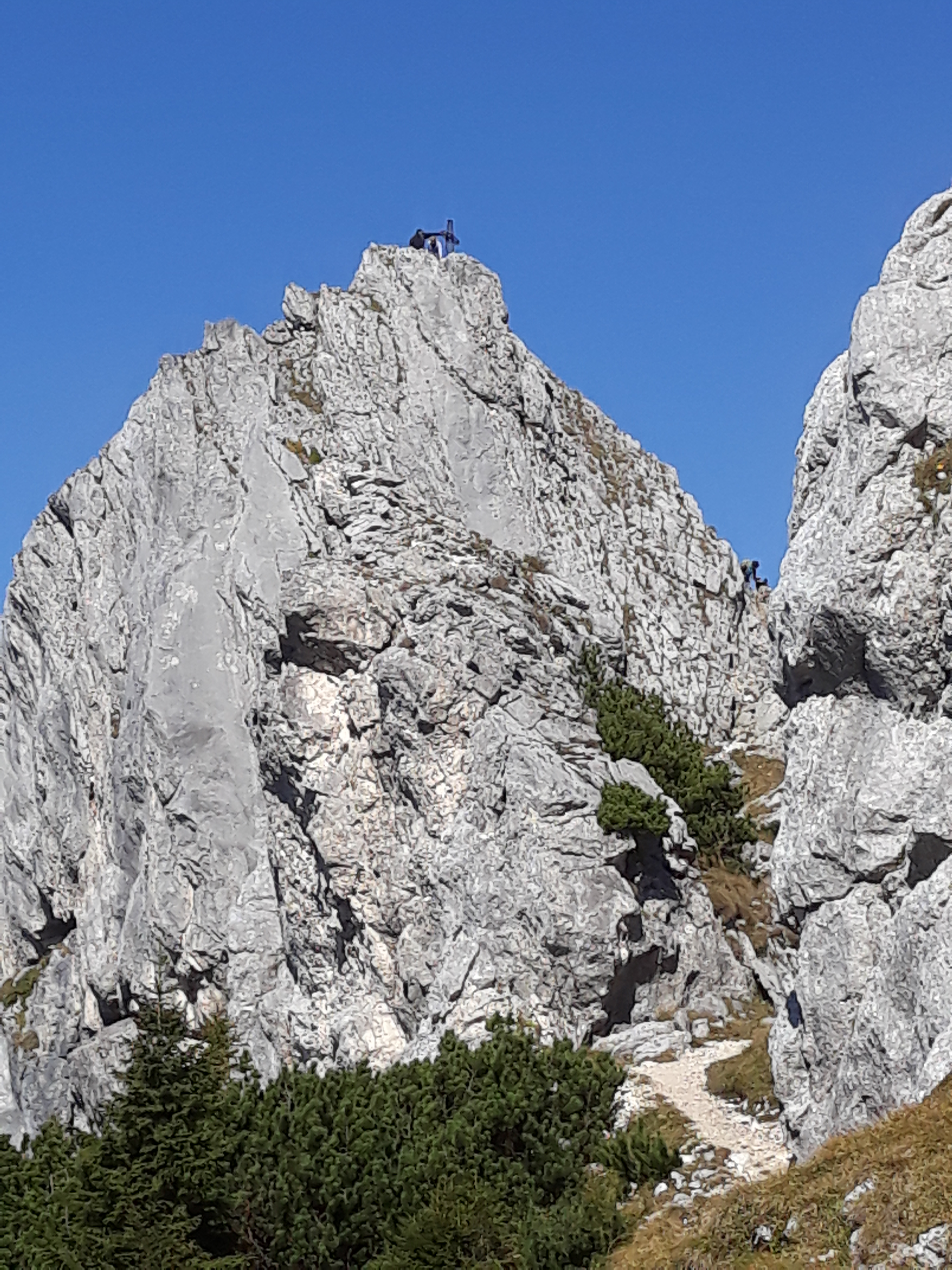 Gipfelaufbau des Teufelstättkopf